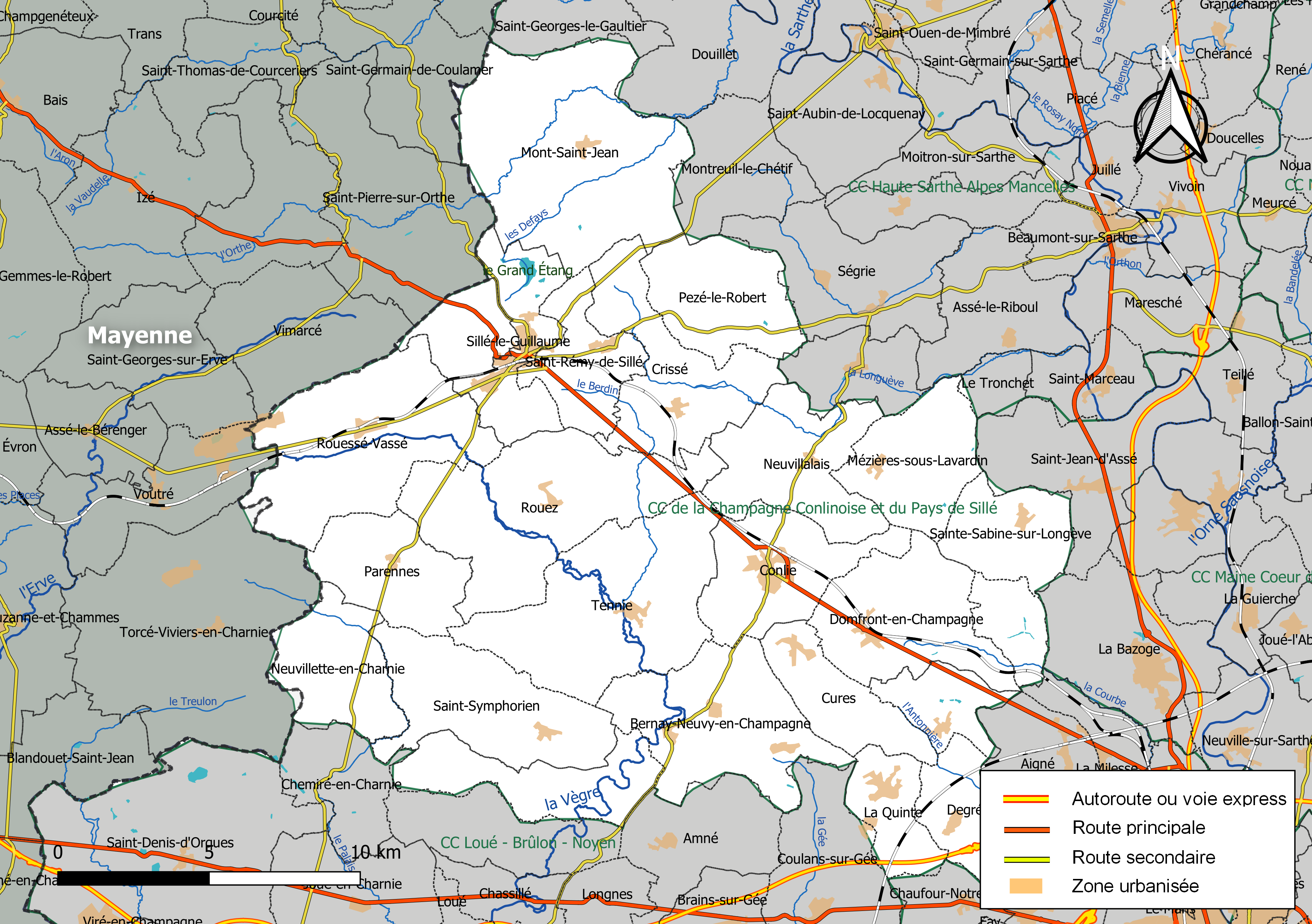 Carte géographique de la Communauté de communes de la Champagne Conlinoise et du Pays de Sillé, département de la Sarthe, France. Composition au 1er janvier 2019.